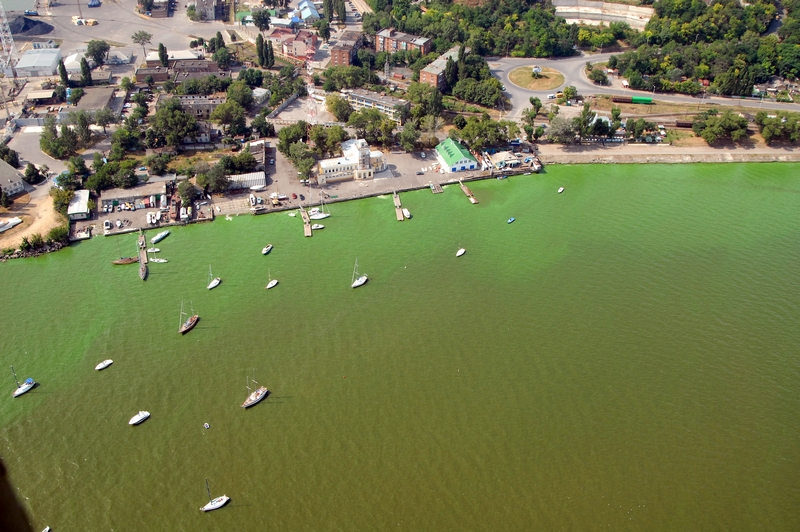 Yachting at Taganrog.